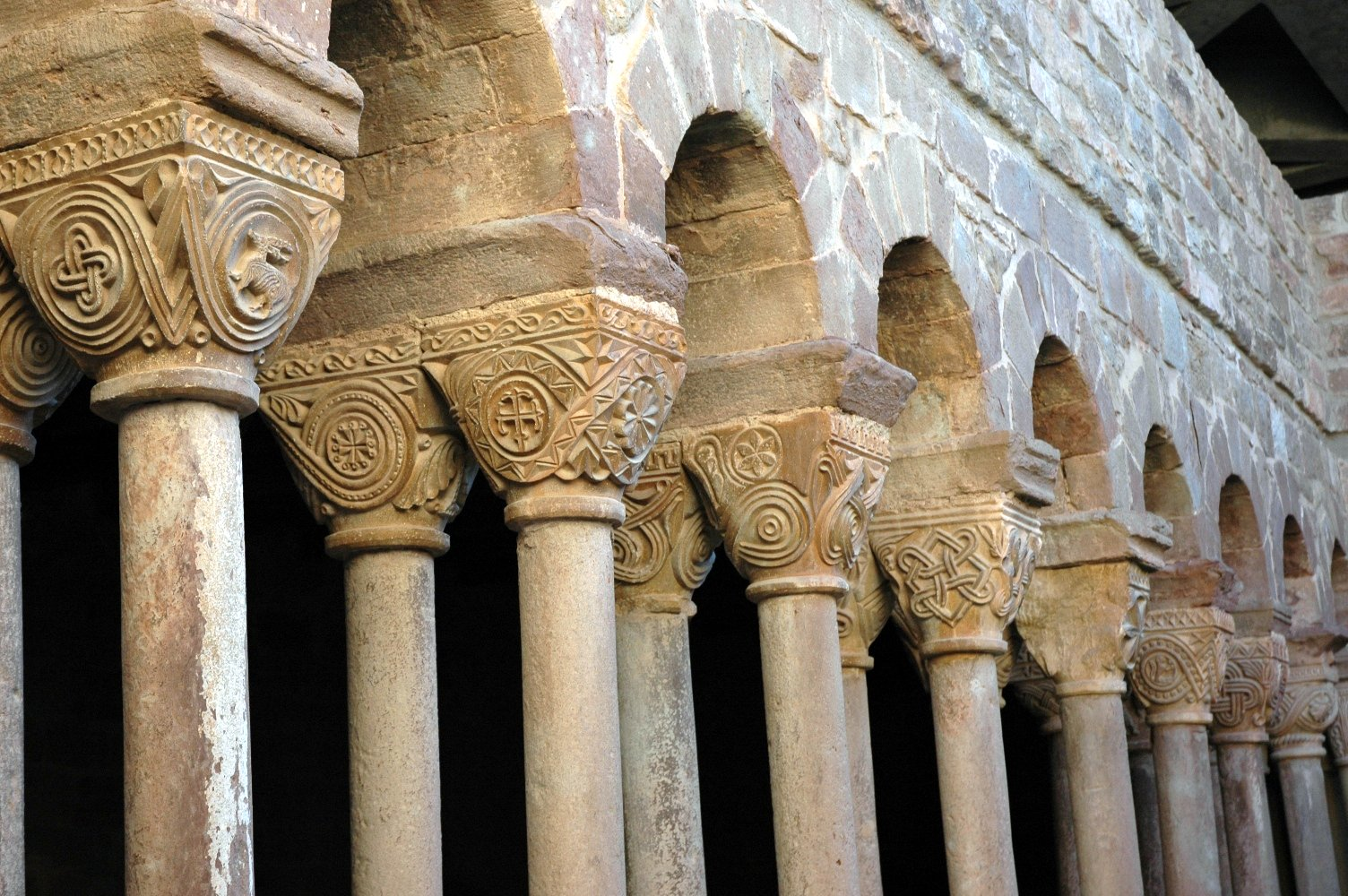 Claustre de Santa Maria de l'Estany - Origen: foto pròpia, autor:Josep Grin.